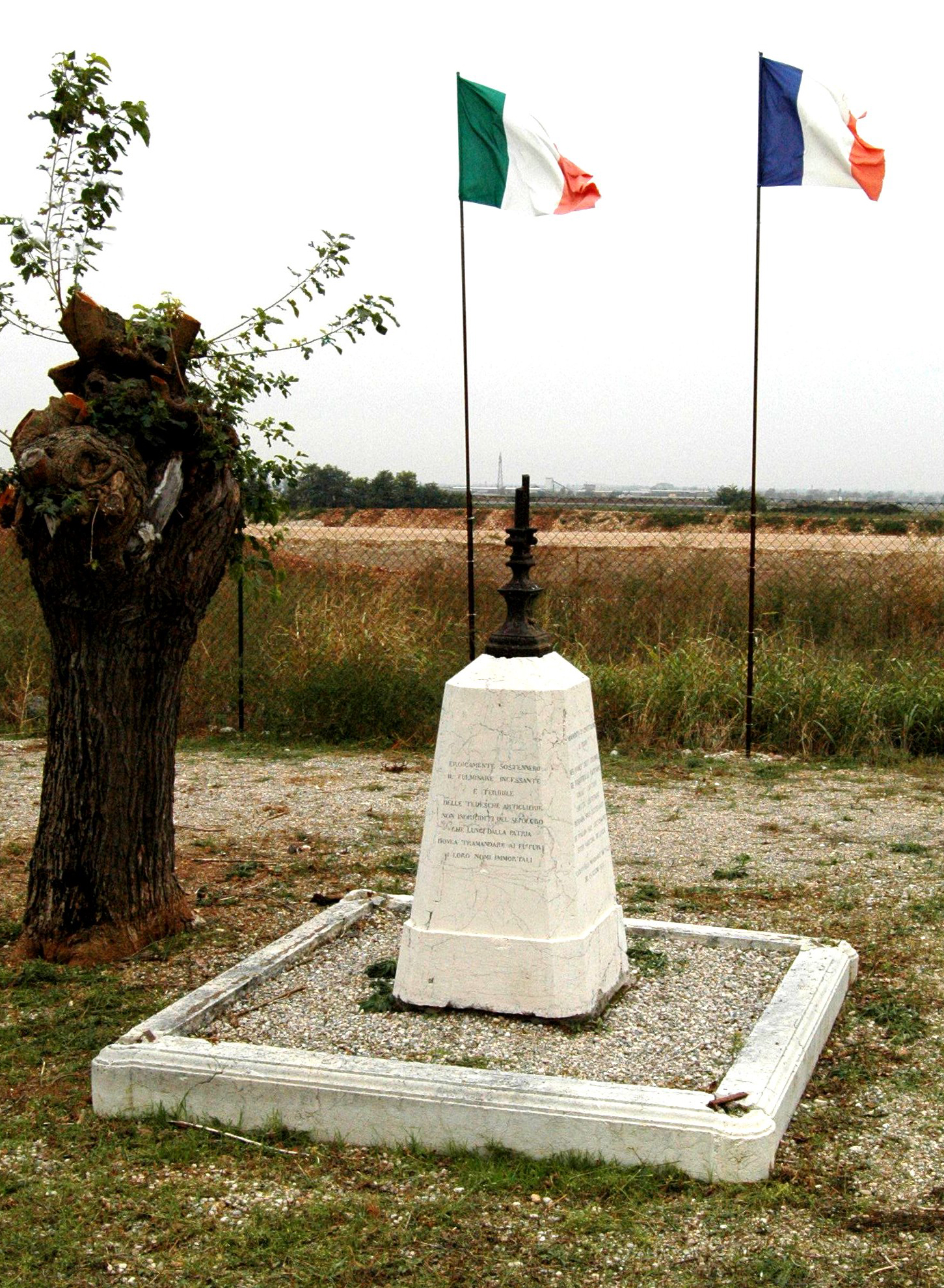 Tombeau d'honneur pour les officiers du 1er régiment de chasseurs d'Afrique et du 5e régiment de hussards, tués dans la bataille de Solferino, a Ca' Fattori, Medole